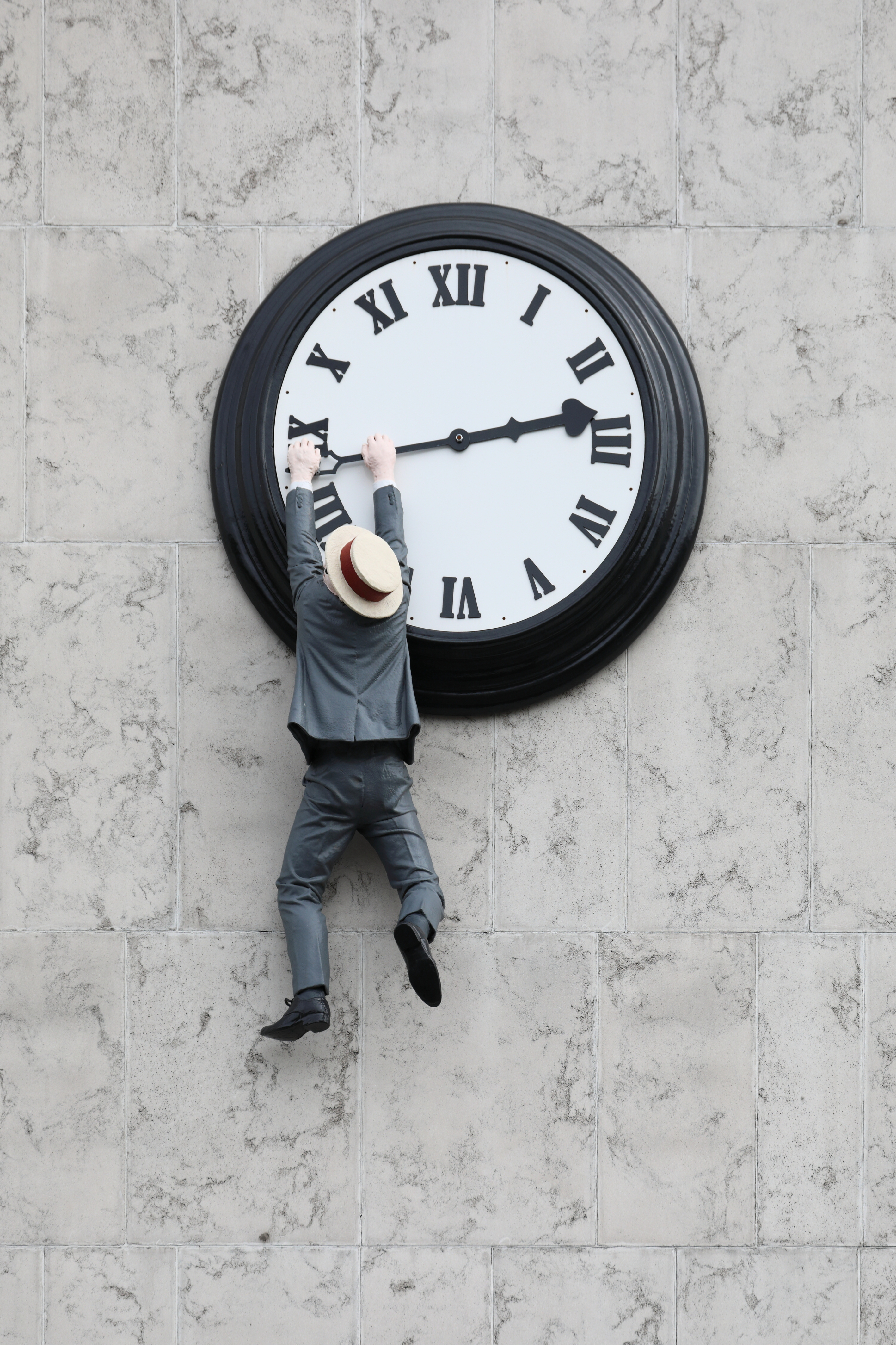 Die Skulptur „Sign of the times“ an der Nordwest-Fassade (lothringerstraßenseitig) des Intercontinental-Hotels im 3. Wiener Gemeindebezirk Landstraße. Geschaffen wurde die am 18. Oktober 2016 enthüllte Skulptur von der Wiener Künstlergruppe Steinbrener/Dempf & Huber im Auftrag der Viennale und ist eine Nachstellung einer Szene aus dem Stummfilm Safety Last!.